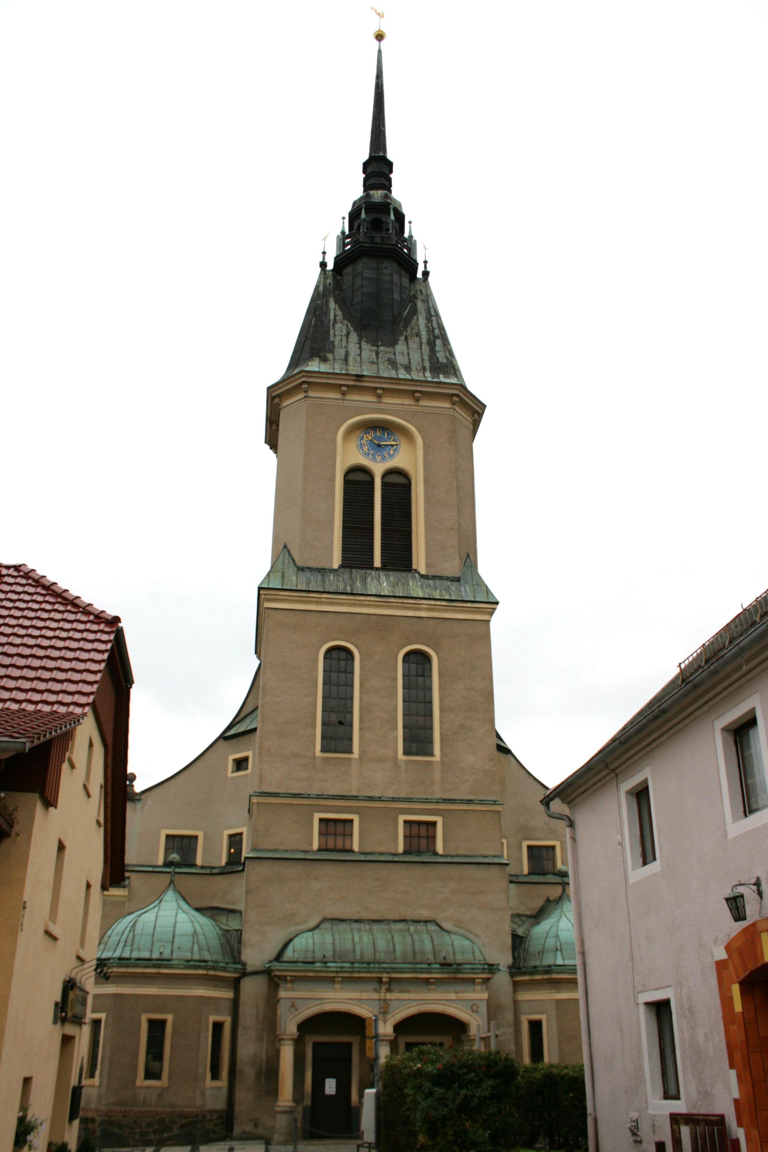 Evangelische Kirche, Dorfstraße in Großpostwitz